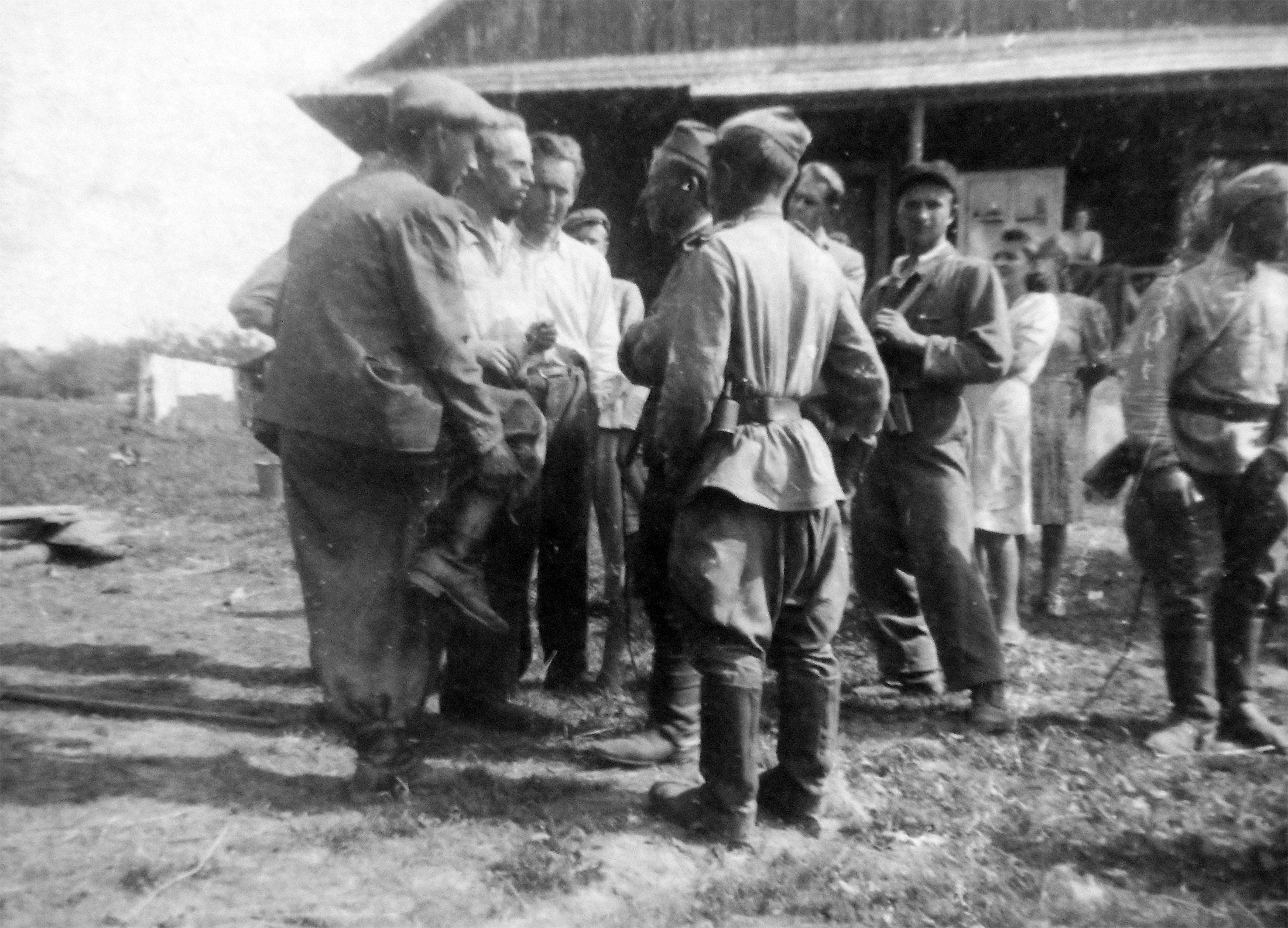 Spotkanie partyzantów polskich z żołnierzami radzieckimi